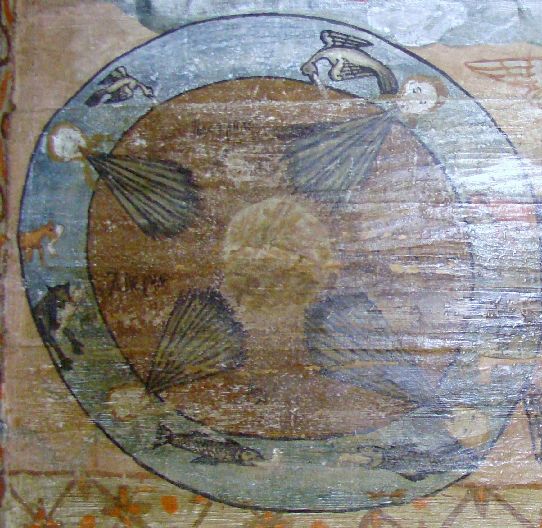 Biserica de lemn "Cuvioasa Paraschiva" , sat POIENILE IZEI